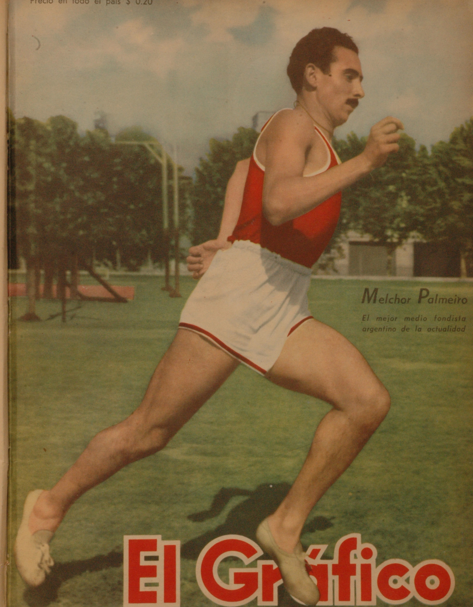 El Grafico del 07 de Febrero de 1947. Edicion 1439